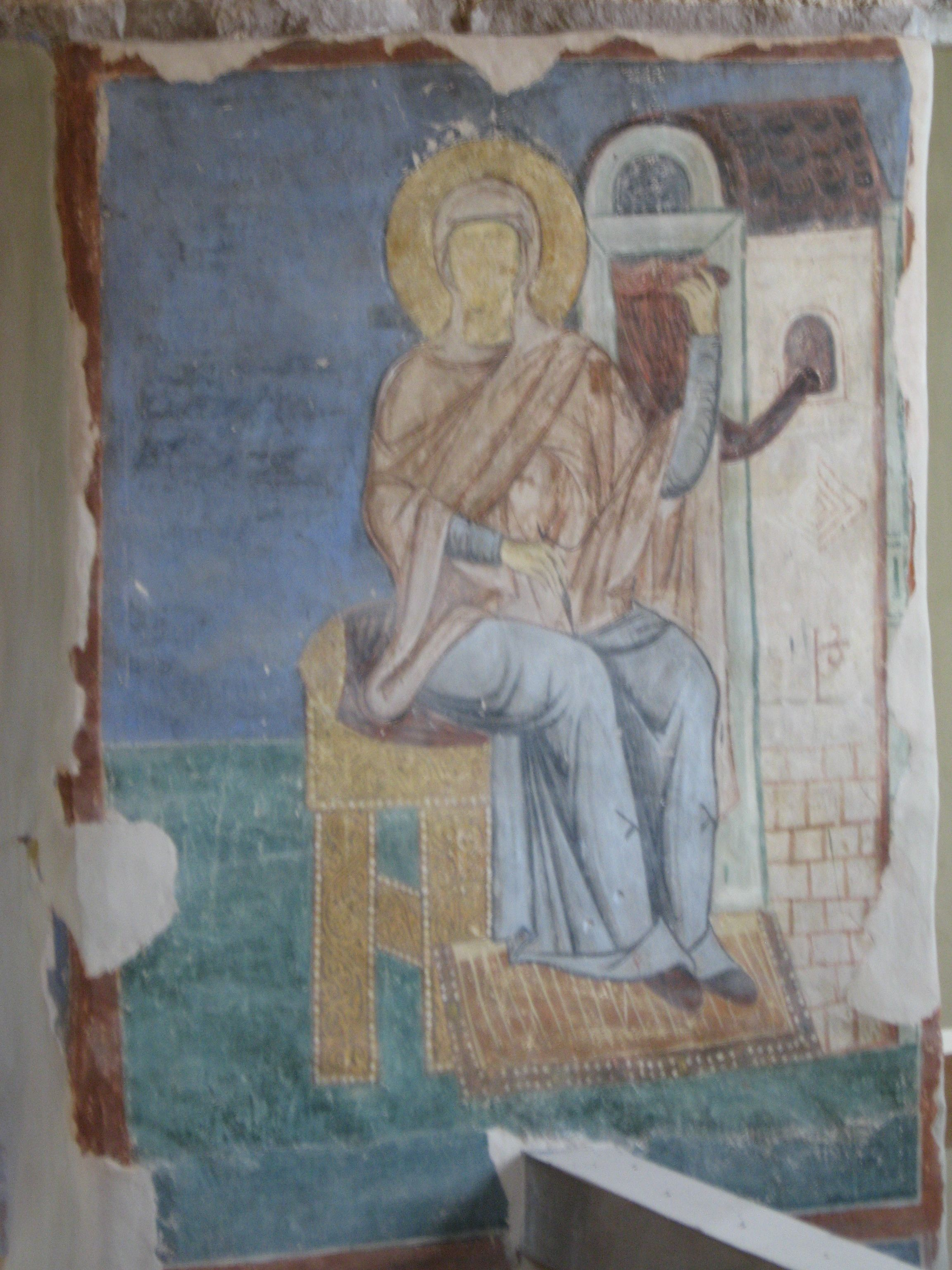 Богоматерь из Благовещения. Фрески собора Антониева монастыря. 1125 год.